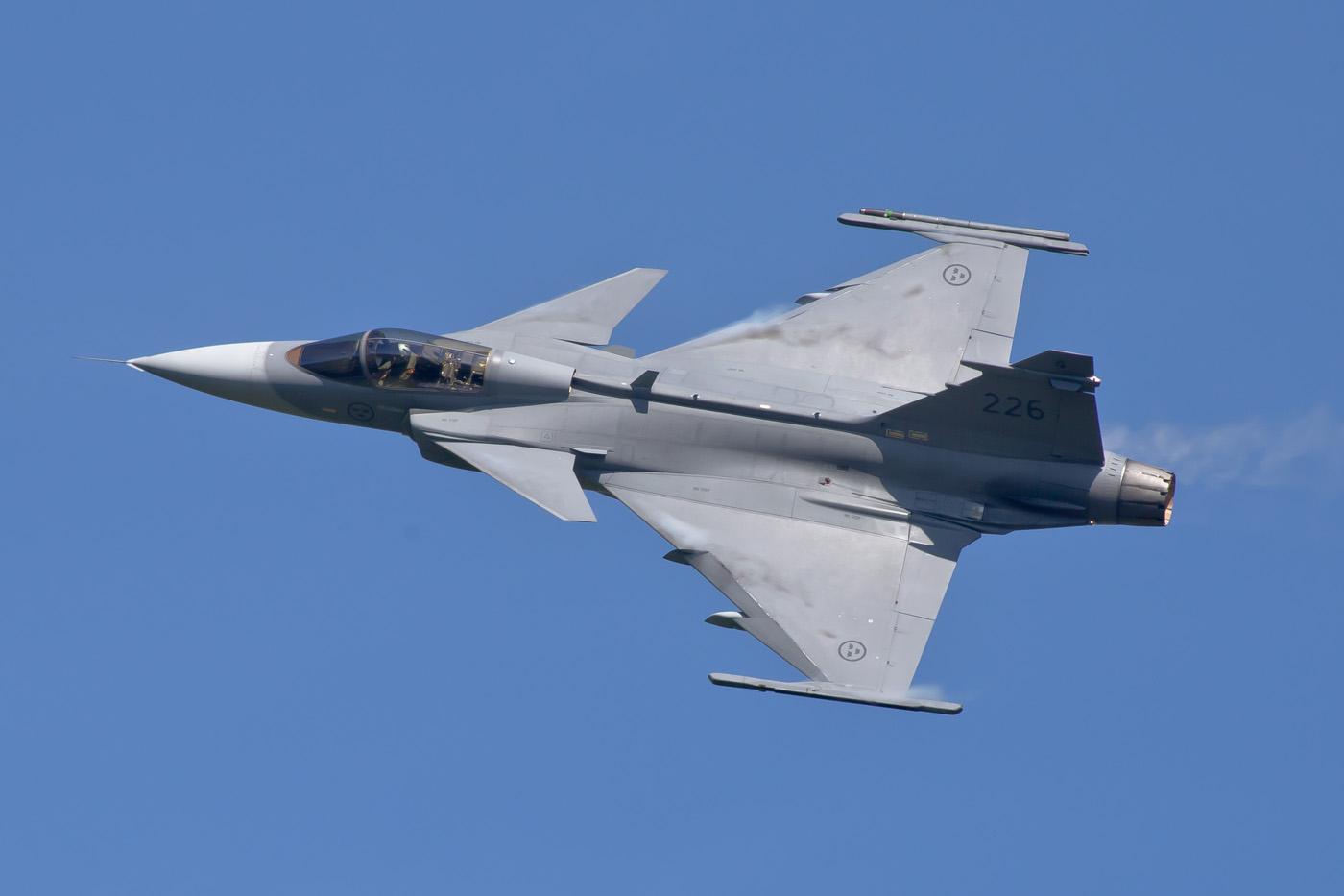 SAAB JAS39 Gripen-7763